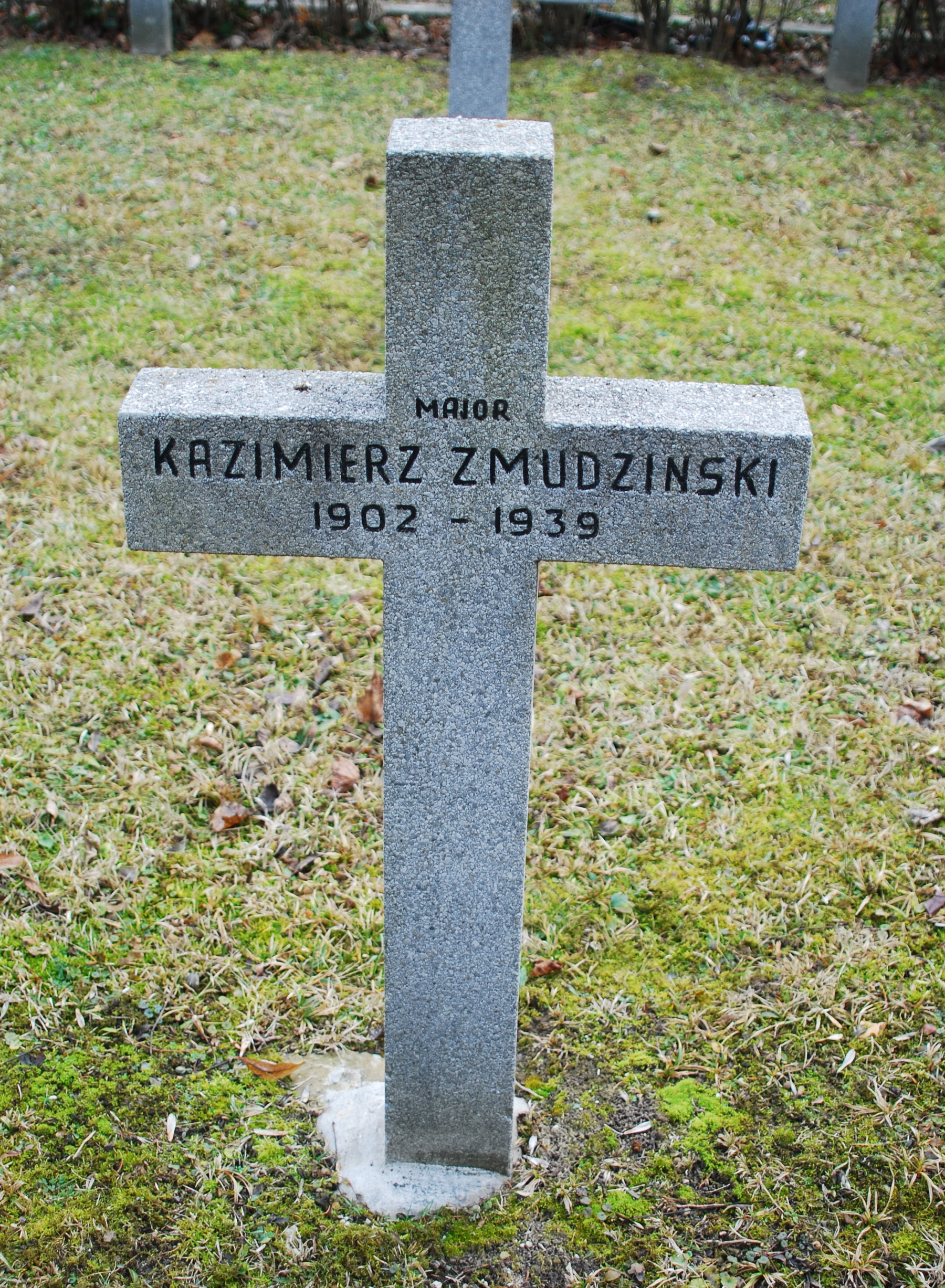 Die Gruppe 88 auf dem Wiener Zentralfriedhof in Wien-Simmering mit einem Soldatenfriedhof für polnische Kriegstote in Österreich